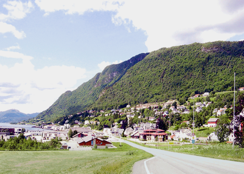 Ørskog and the Sjøholt